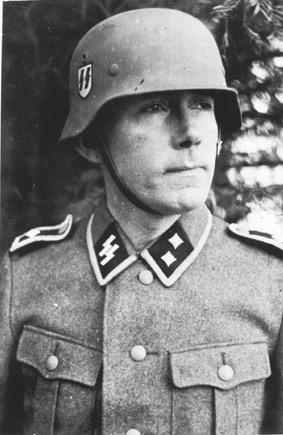 Van Rappard in het uniform van SS-Oberscharführer, eind 1944/begin 1945